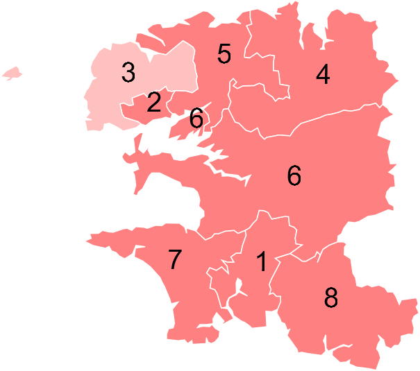 Résultats des élections législatives du Finistère en 2012